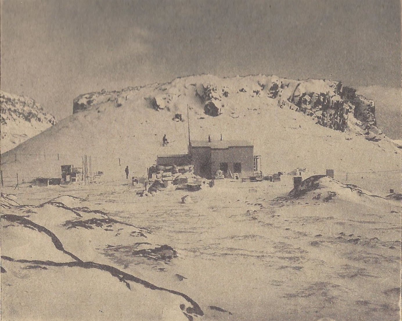 Fotografie vom Wohnhaus der deutschen Südpolarexpedition 1901-1903